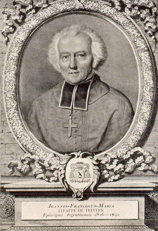 Joannes-Franciscus-Maria Lepappe de Trévern, Buste, face en méd. rond sur socle. Bibliothèque nationale et universitaire de Strasbourg